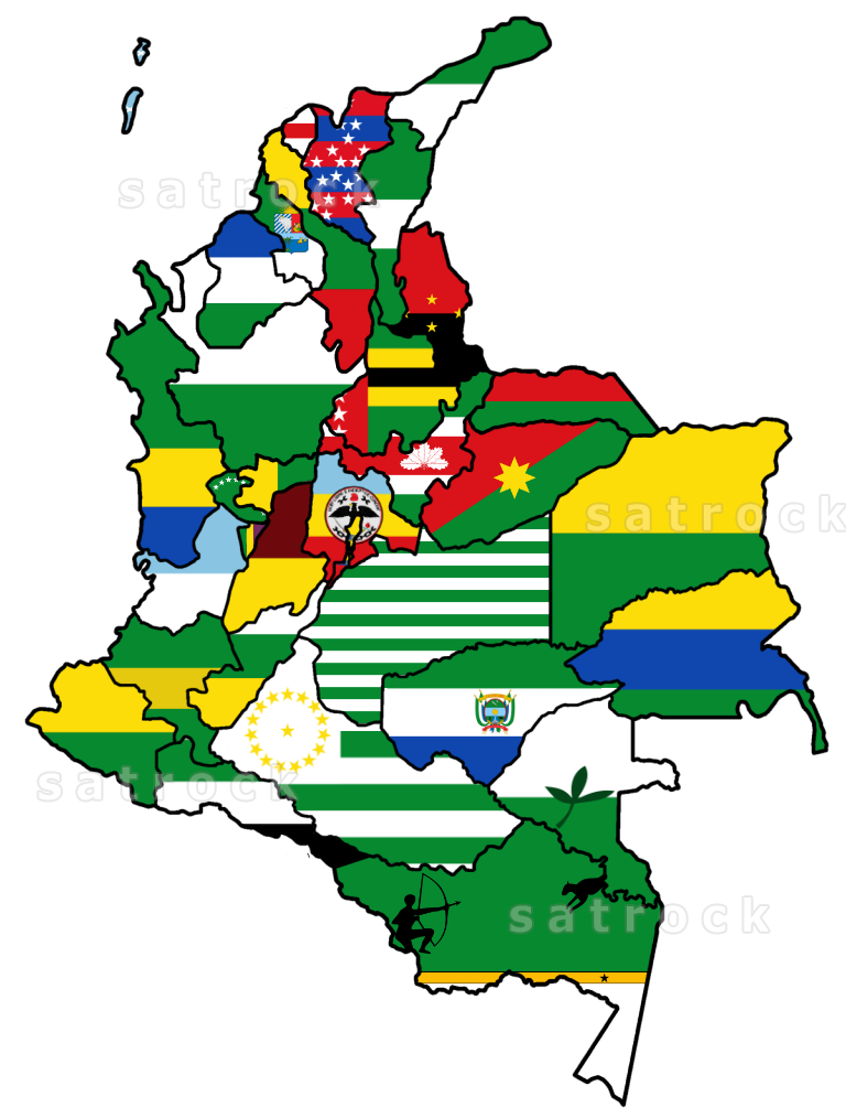 Mapa político de Colombia donde cada Departamento tiene su respectiva bandera. Hecho por Satrock